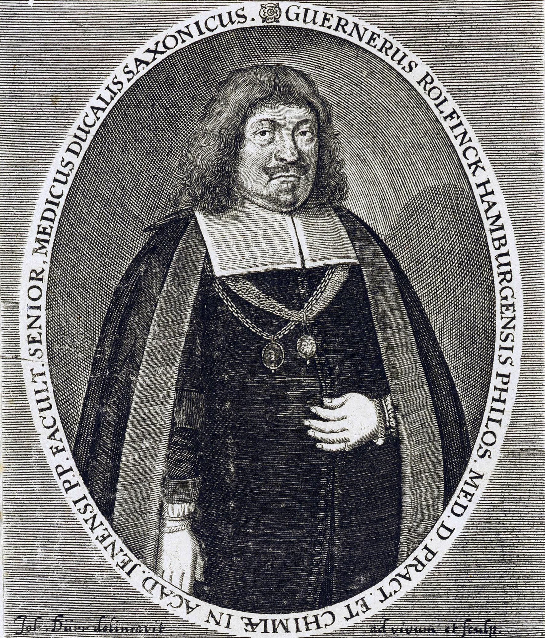 Bildnis Werner Rolfinck (1599–1673)